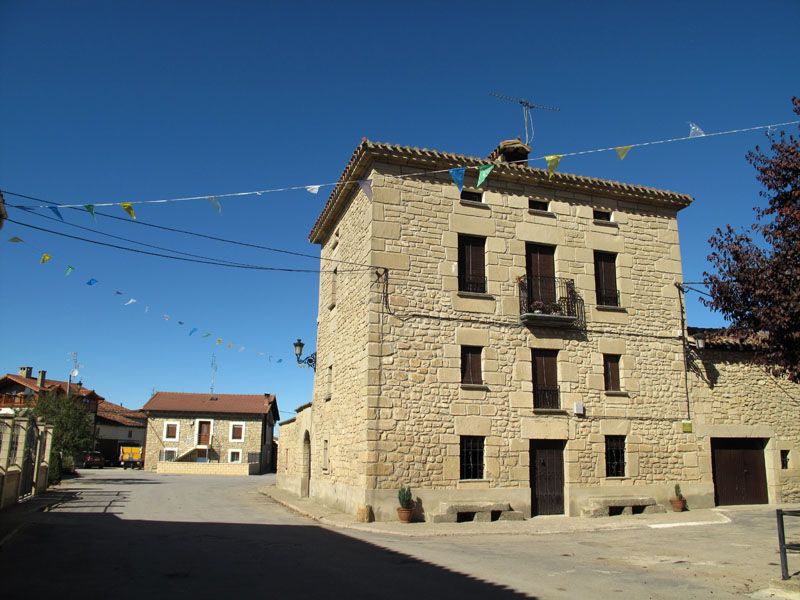 Calle de la localidad de Suzana (Miranda de Ebro, España)